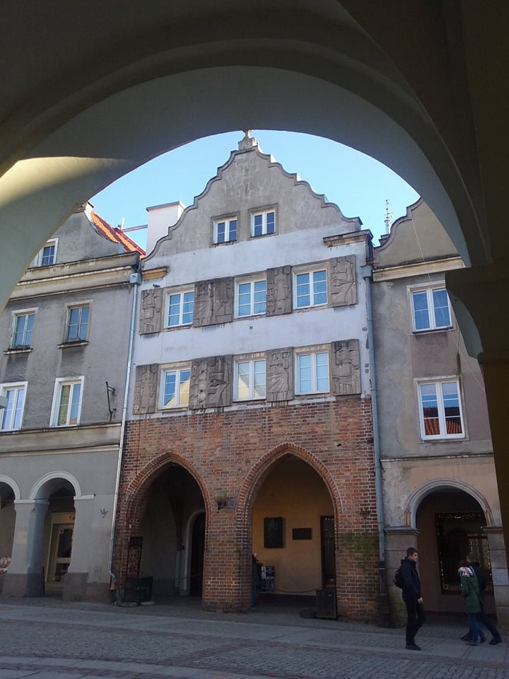 Dom Burmistrza w Olsztynie, widok od strony Starego Ratusza